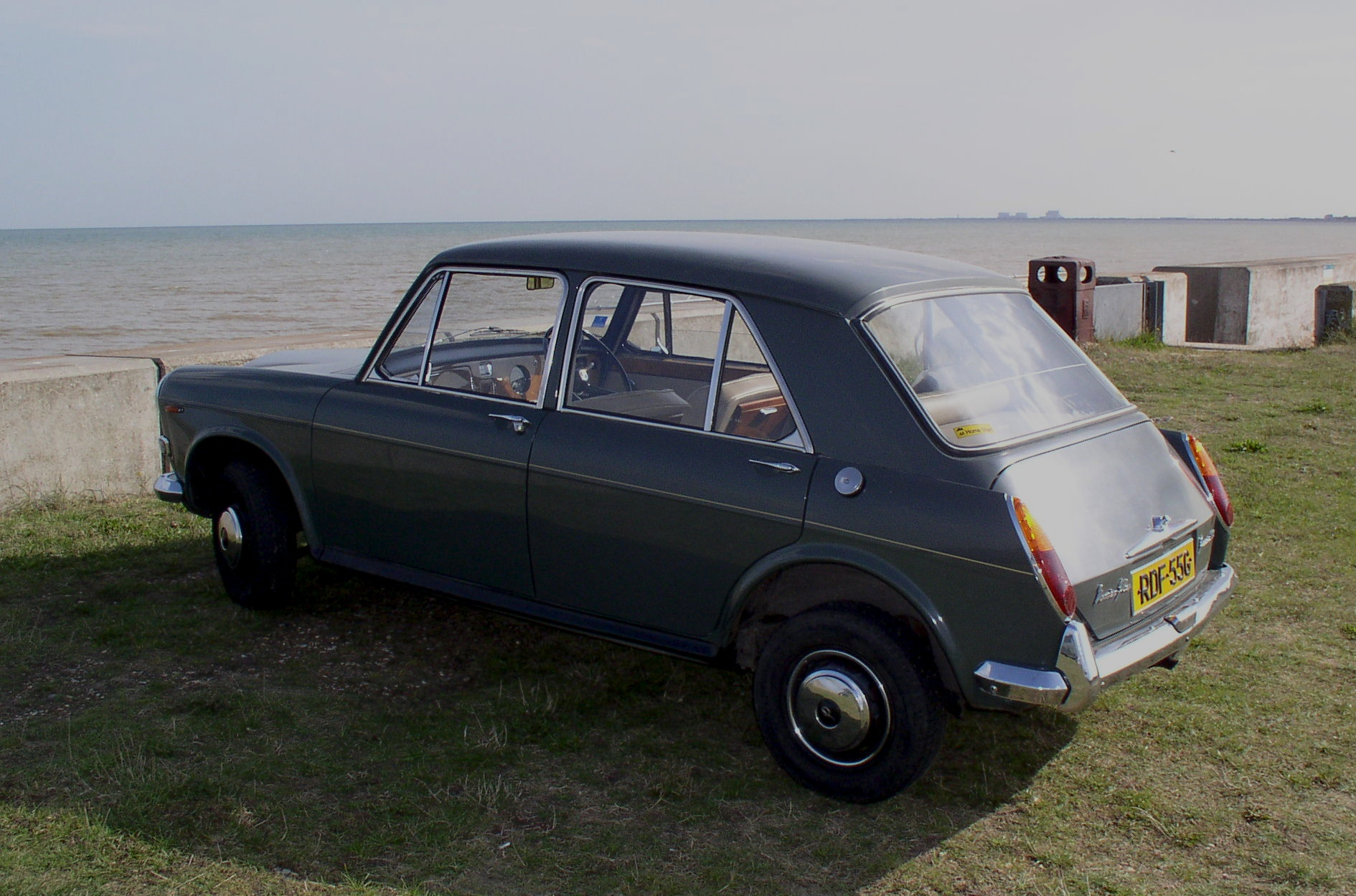 Vanden Plas Princess 1300